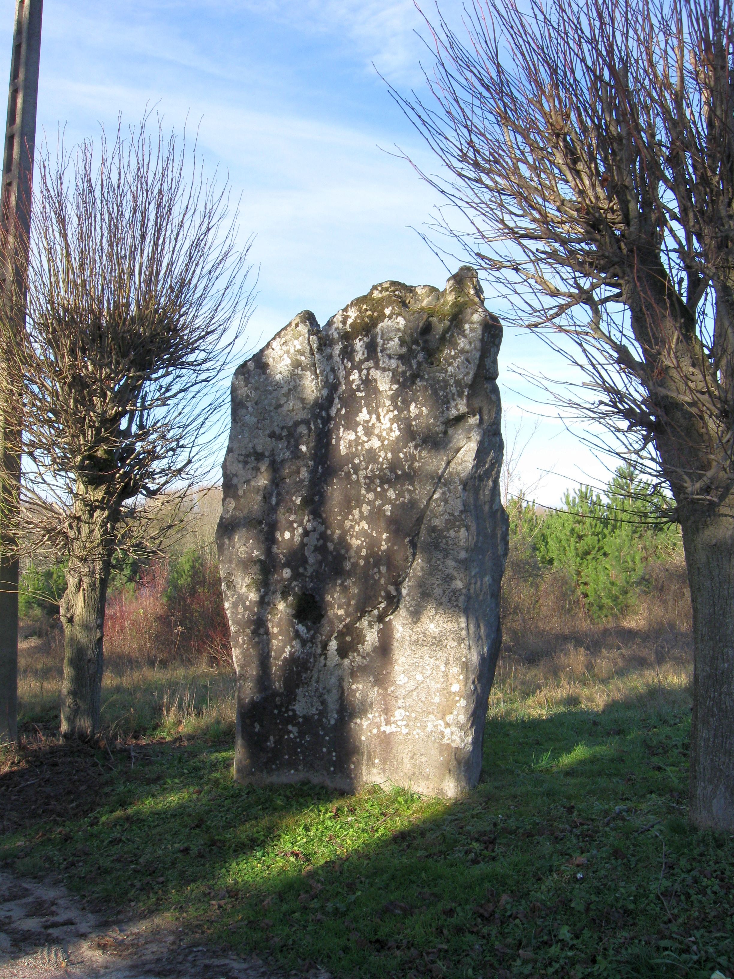 Menhir dit La pierre droite à Écuelles. (Seine-et-Marne, région Île-de-France).